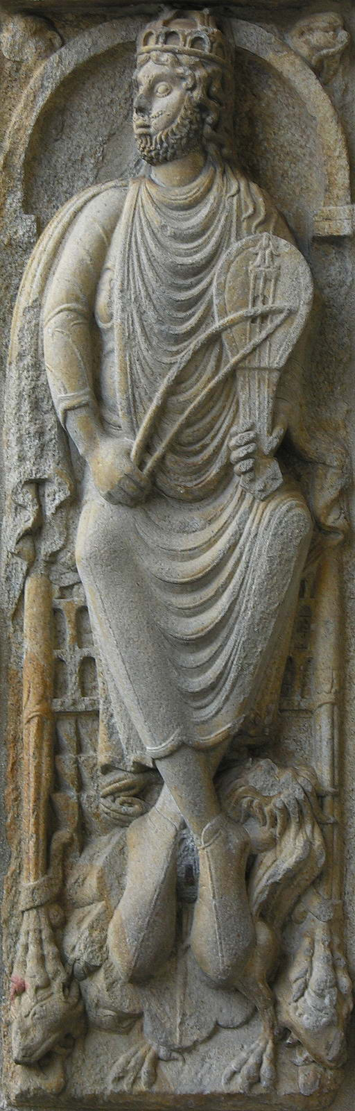 Relevo do Rei David na porta da Catedral de Santiago de Compostela, praza de Praterías.